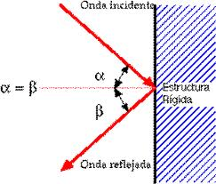 ley reflex